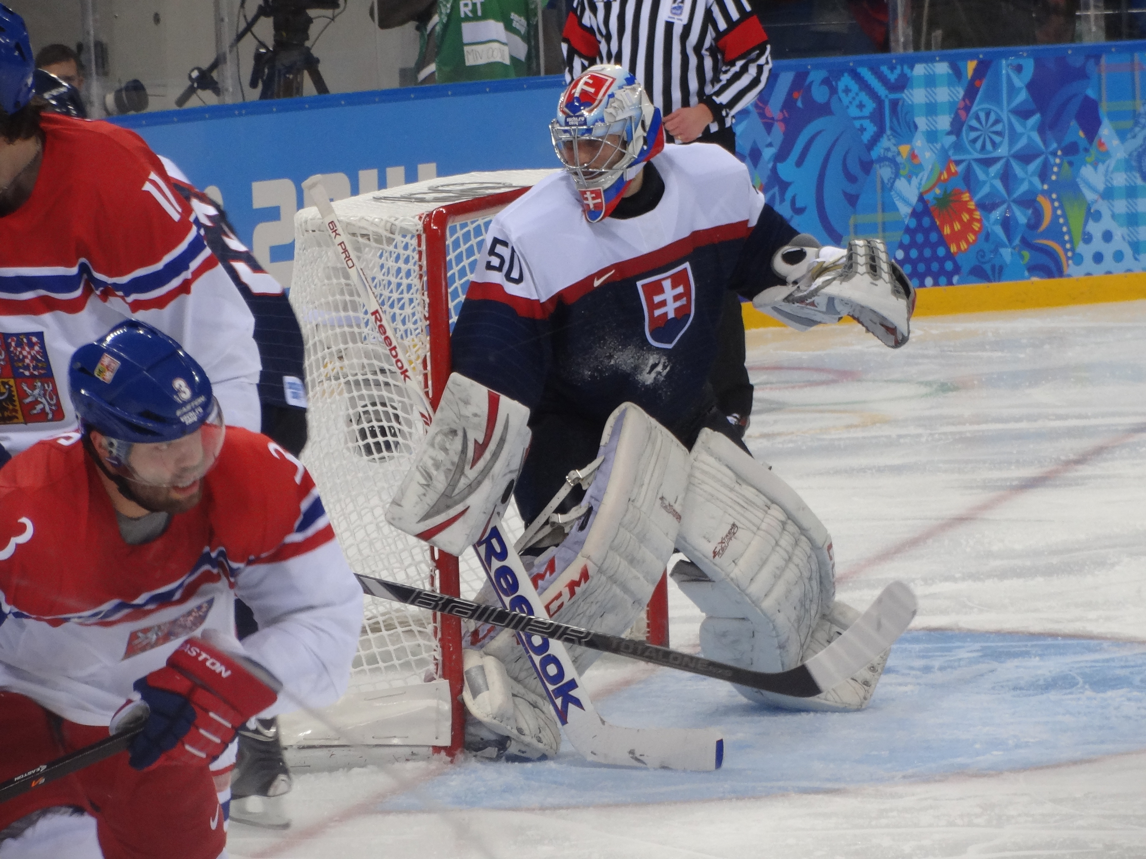 18 февраля 2014 года, Ледовая Арена "Шайба". Чехия - Словакия 5:3 (3:0, 1:1, 1:2)